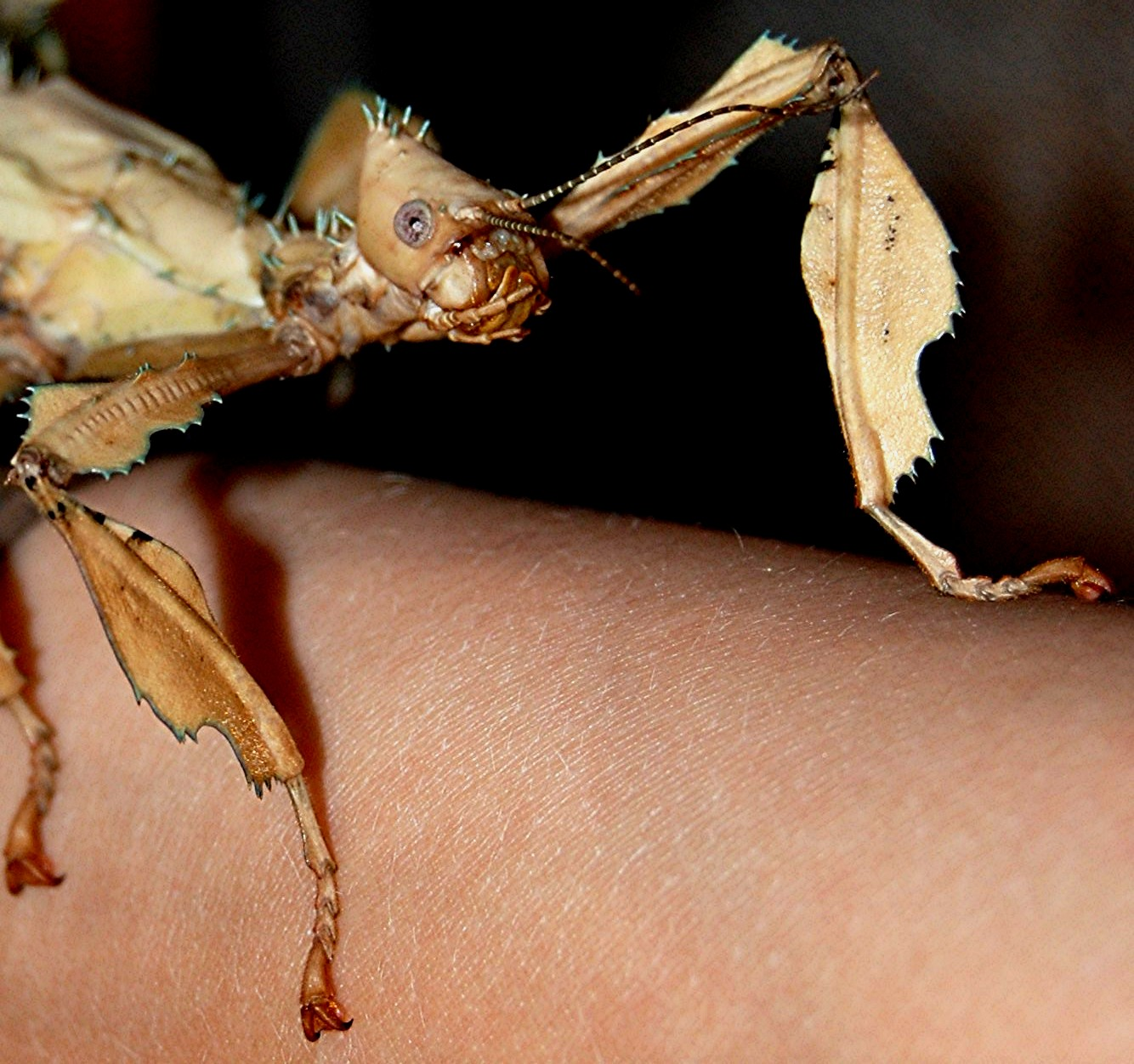 Extatosoma tiaratum ♀ Portrait